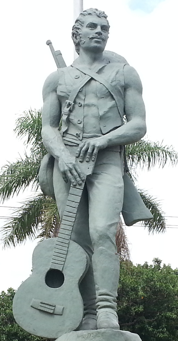 Estatua de José Manuel Baca en Santa Cruz, Bolivia. This medium shows the protected monument with the number S/00-019 in Bolivia.